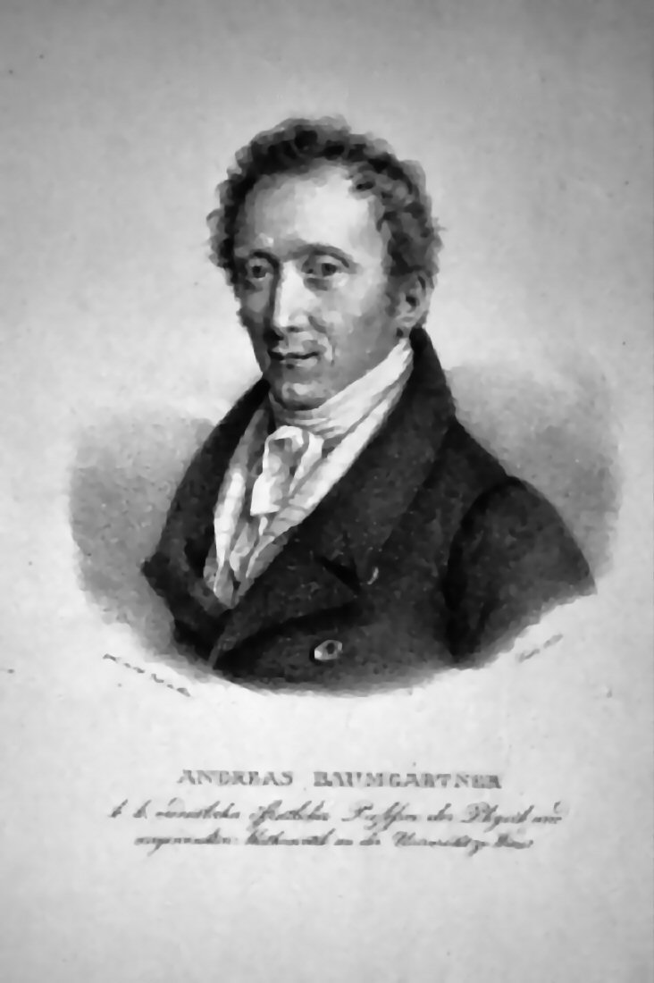 Andreas Freiherr von Baumgartner, Lithographie von Friedrich Johann Gottlieb Lieder, 1826